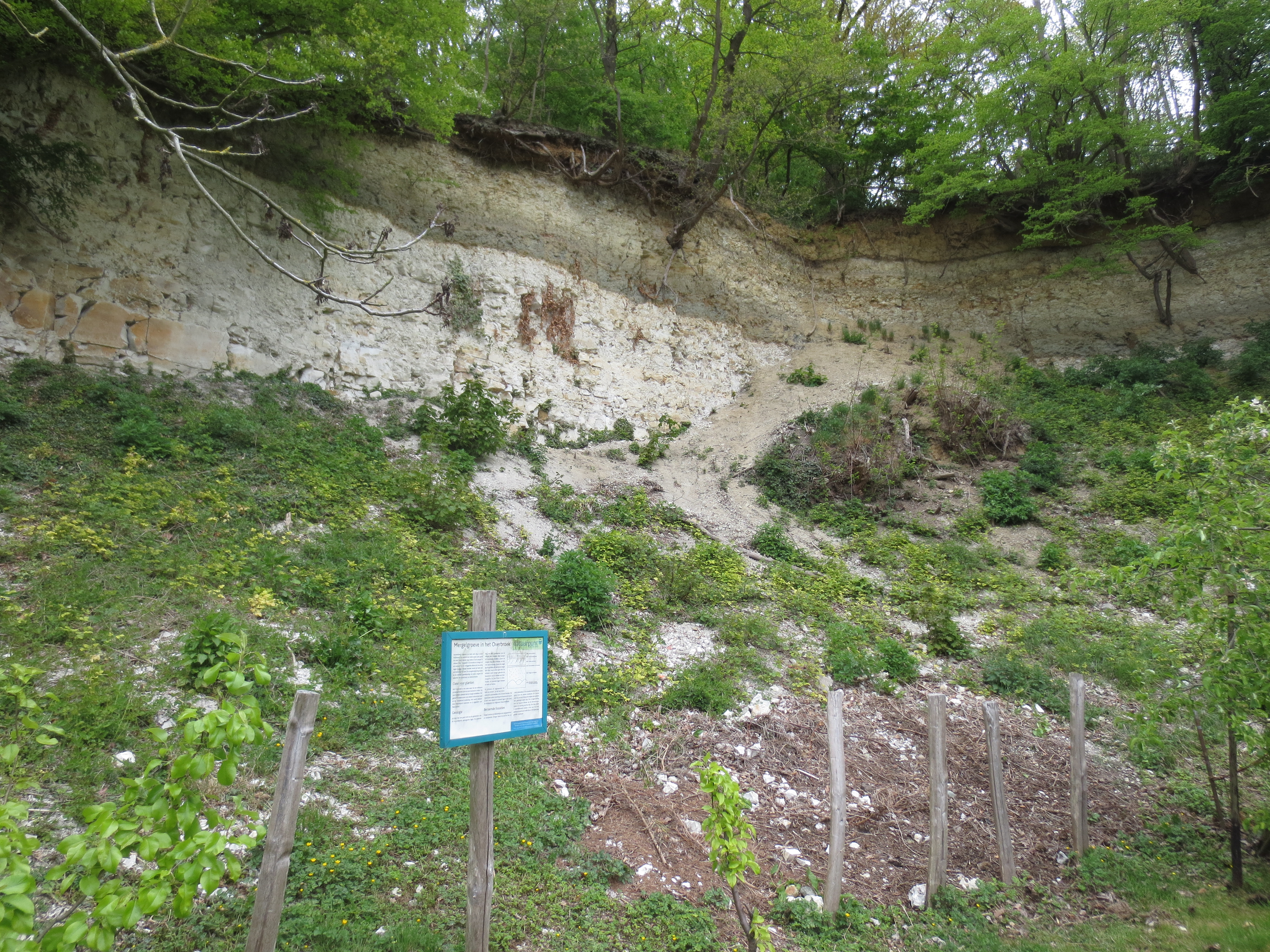 Wand van vroegere 'mergel'-afgraving in Overbroek (Gelinden) waarin talrijke beroemde fossielen werden gevonden.